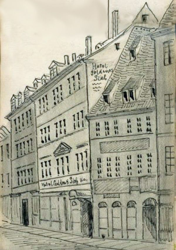 Die Vorgängerbauten des Messehauses Union am Hallischen Tor in Leipzig: Börsen Café, Hotel Goldenes Sieb und Gasthof Halber Mond.